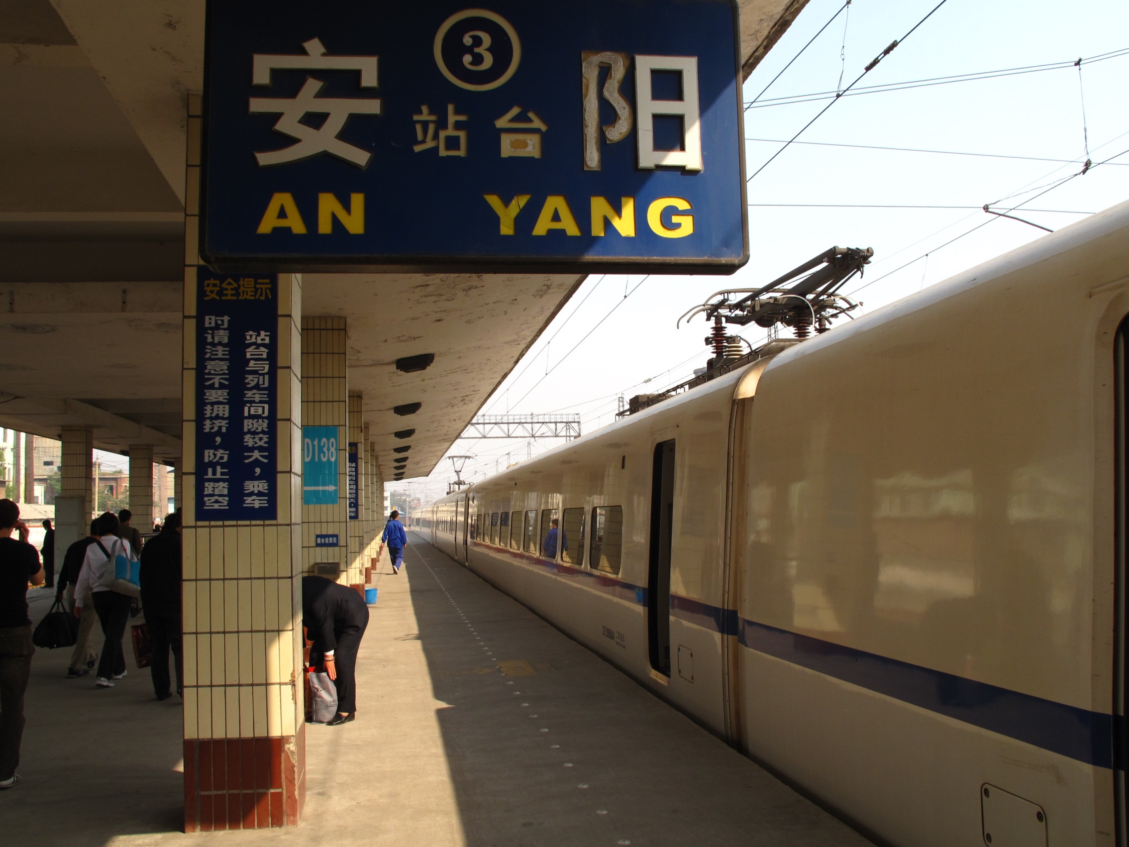 anyang here we are ! anyang, henan china Anyang Railway Station